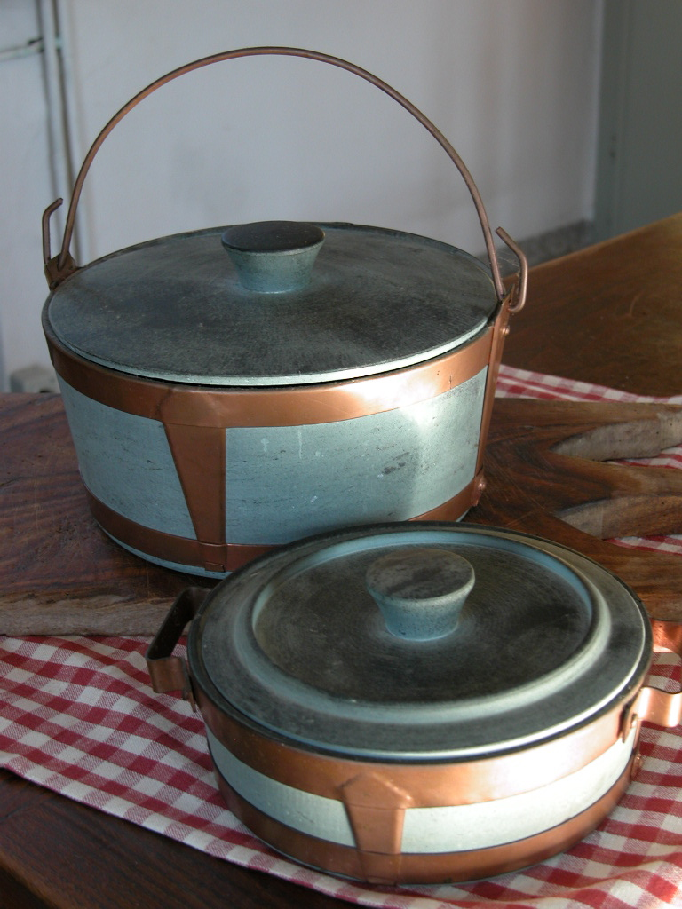 Foto mia personale, lavec in pietra ollare, provenienza Chiesa Valmalenco, Valtellina